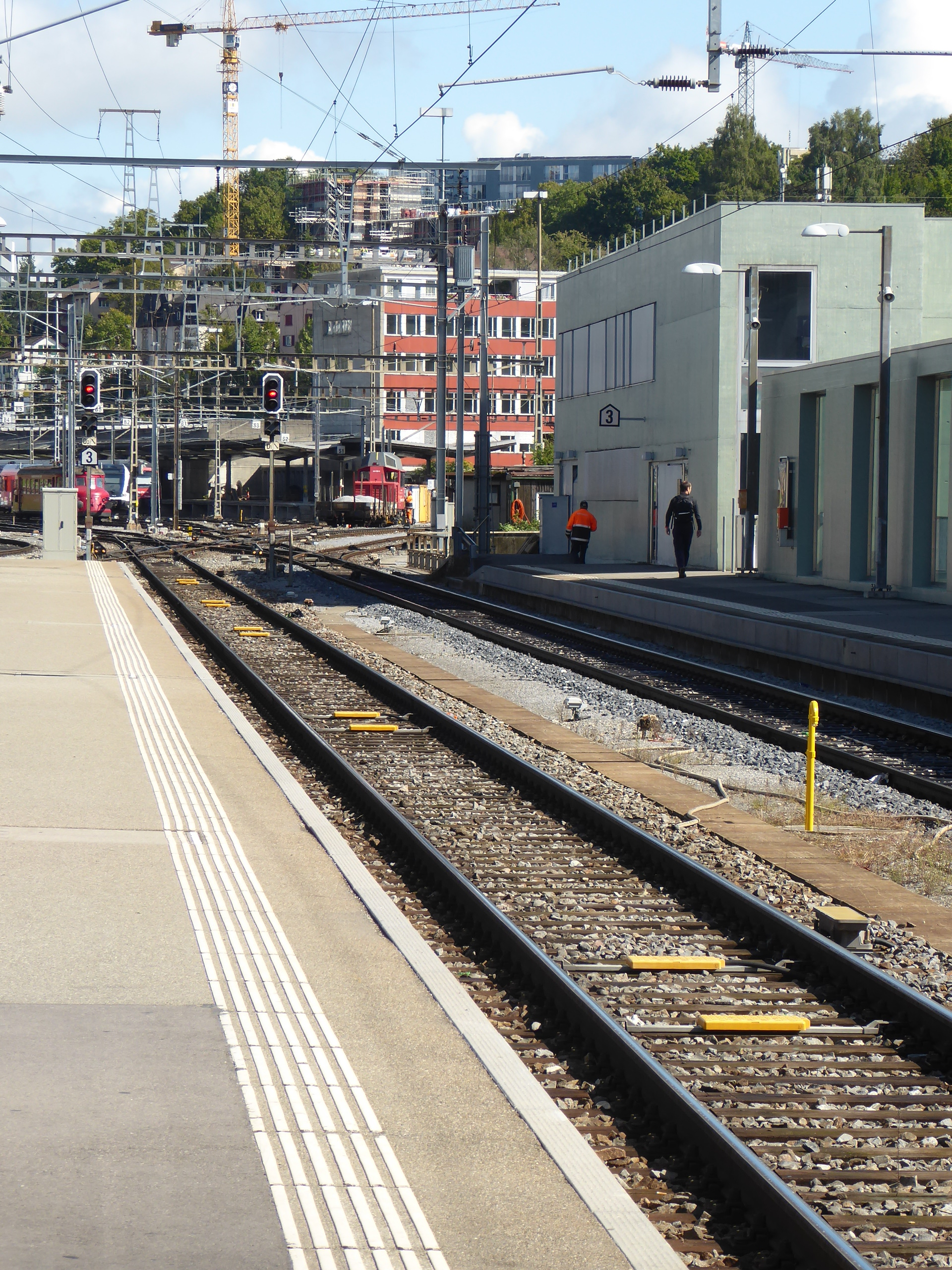 Um eine ZUB 121-Linienschleife für kontinuierliche Signalübertragung durch ETCS zu ersetzen, ist eine Kaskade von Balisen notwendig. Bahnhof Schaffhausen, Gleis 2 Seite Herblingen